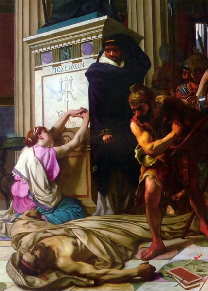 Camille-Félix Bellanger, La mort de Démosthène, 1879, collection particulière